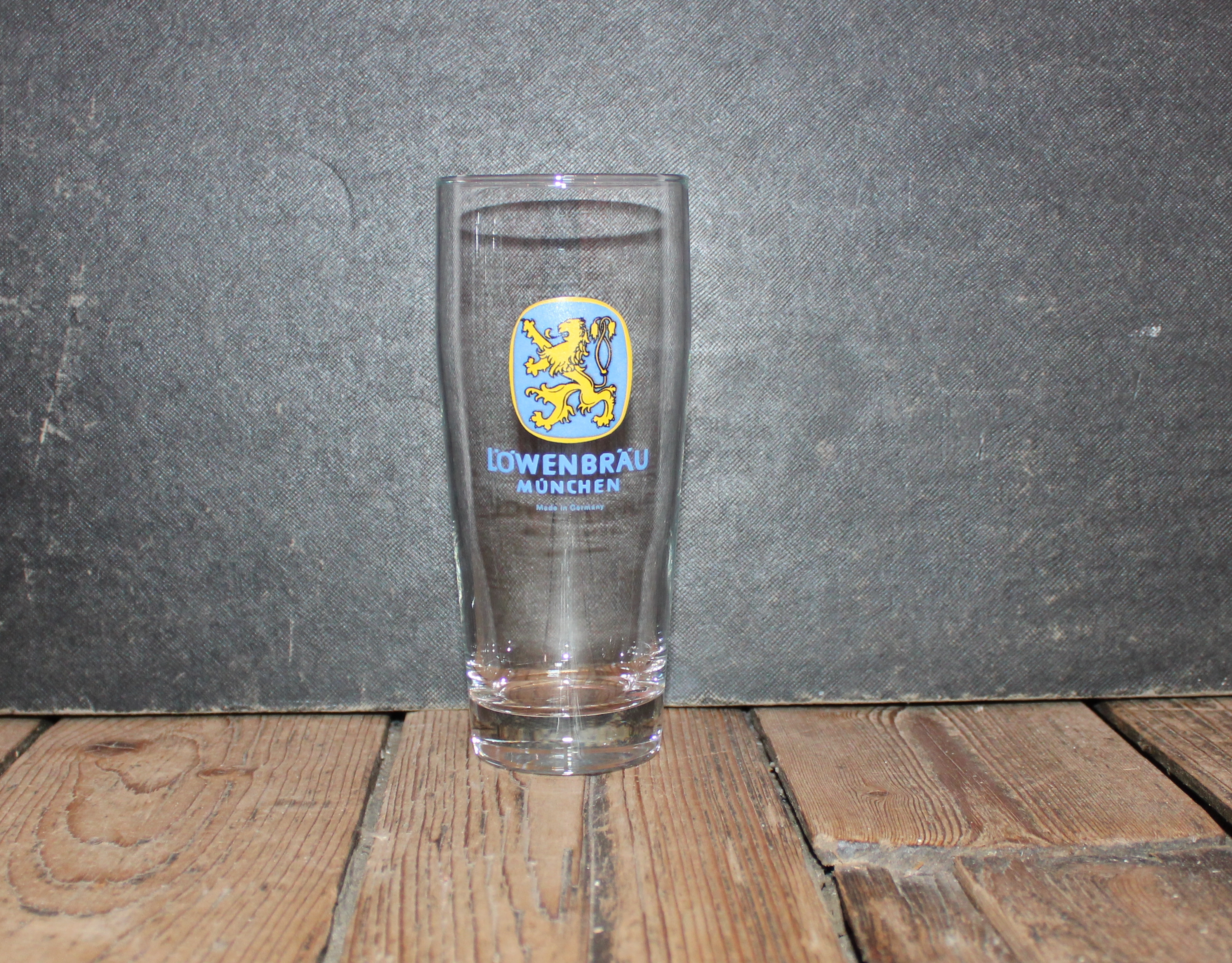 Verre à bière Löwenbrau München